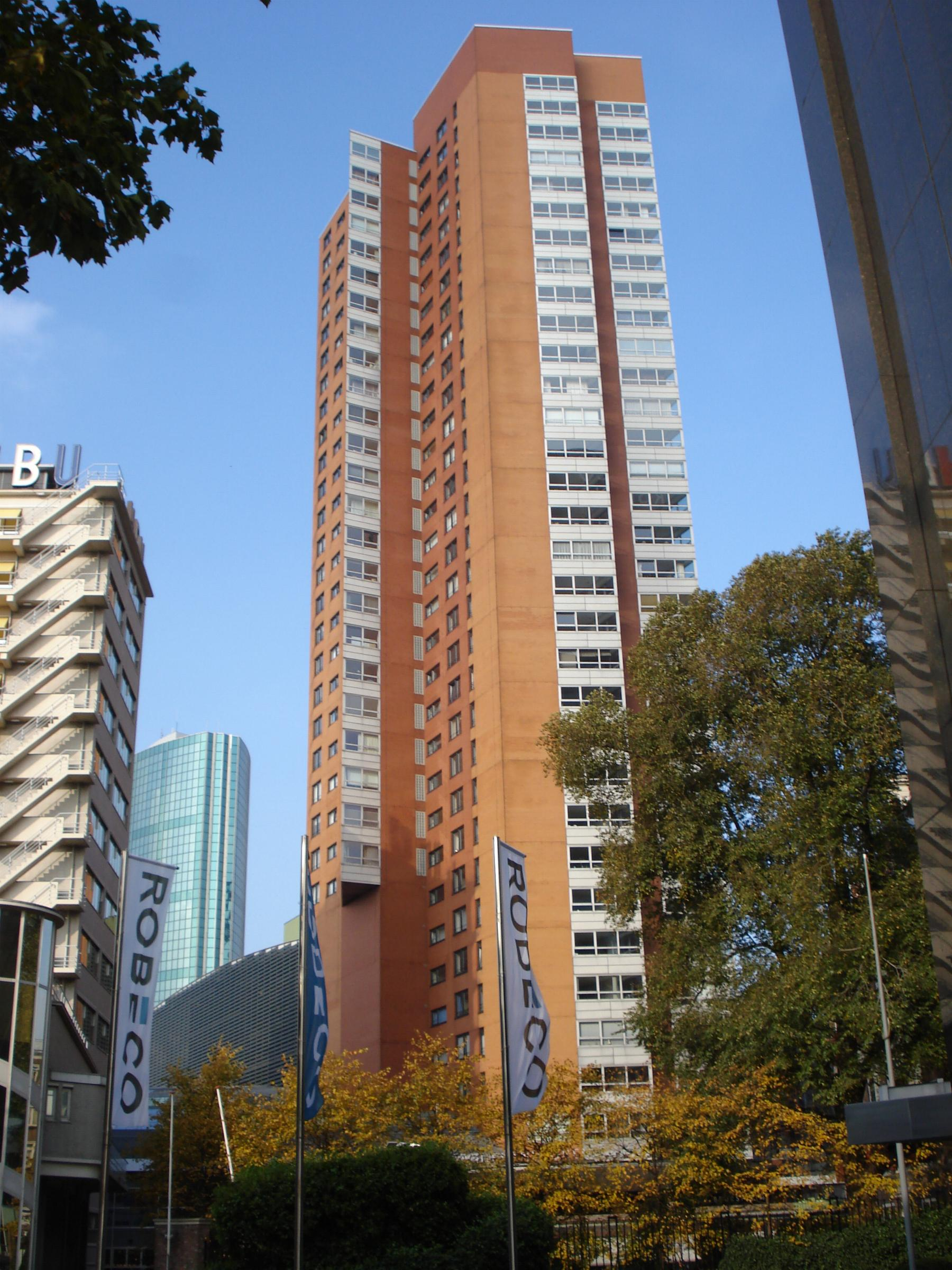 Rotterdam Centrum, Bulgersteijn. Woontoren "Schielandtoren".